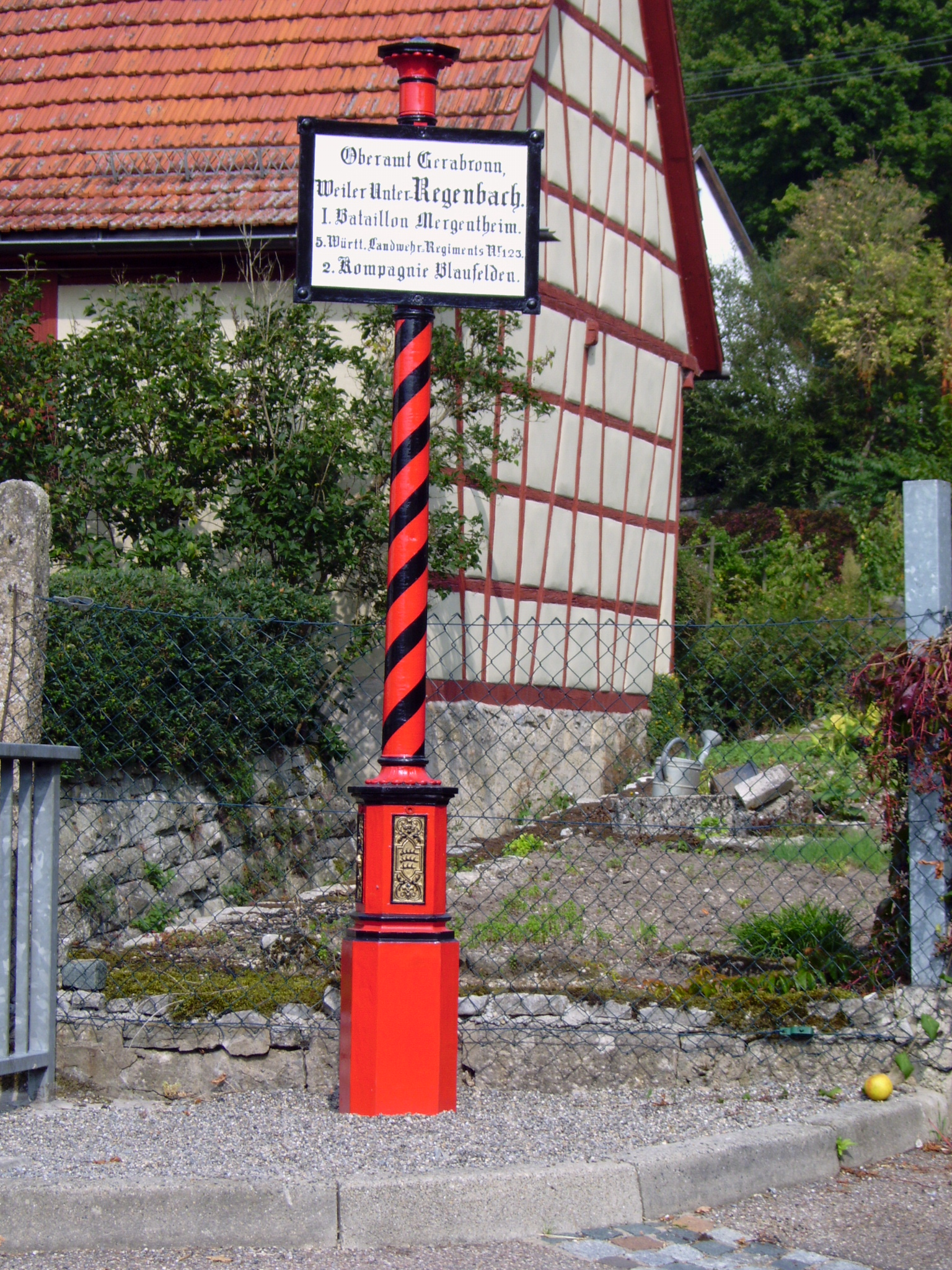 Historischer Ortsstock in Unterregenbach